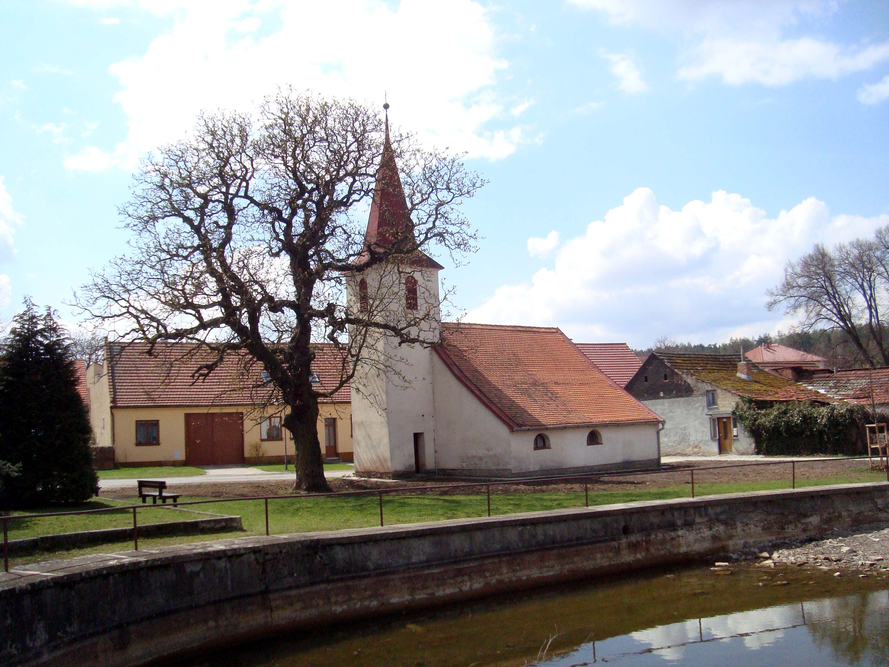 Babice u Rosic Náves s kaplí a rybníkem